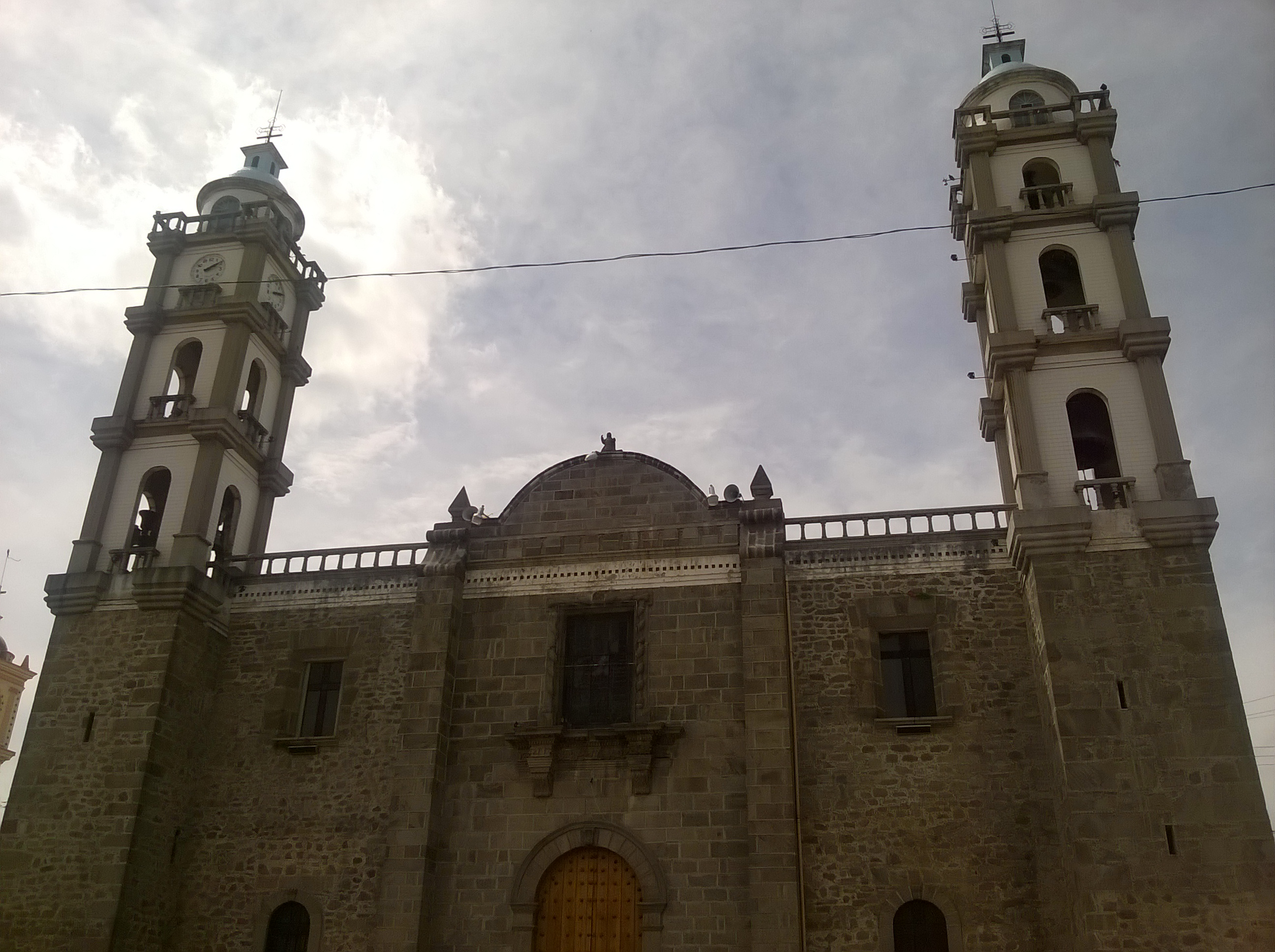 Parroquia de San Miguel Canoa, Puebla